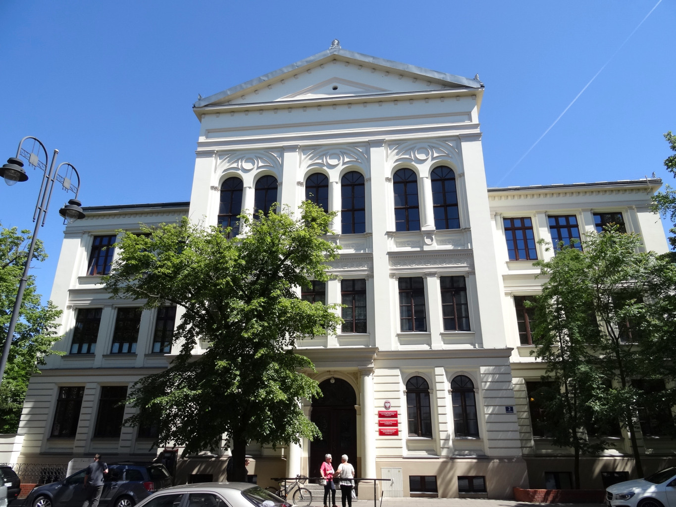 Budynek Zespołu Szkół Plastycznych w Bydgoszczy (1875-1878, Heinrich Grüder) przy ul. Konarskiego